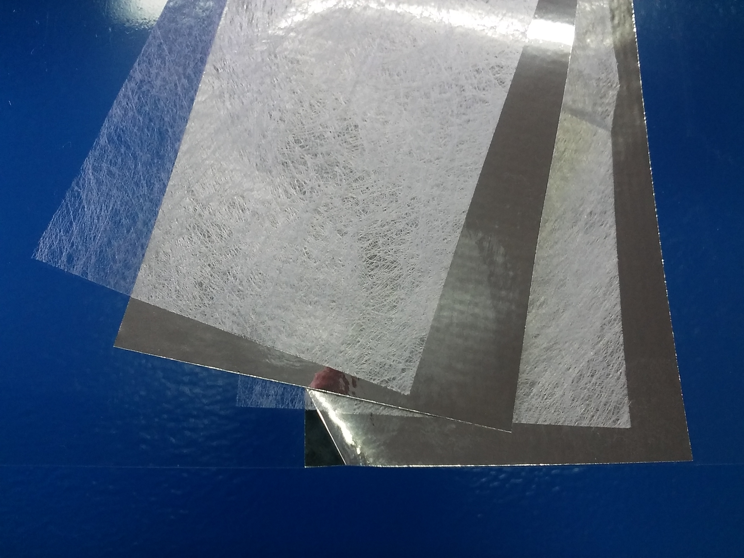 Fragment izolacji MLI ukazujący 2 warstwy ekranów i przekładek.